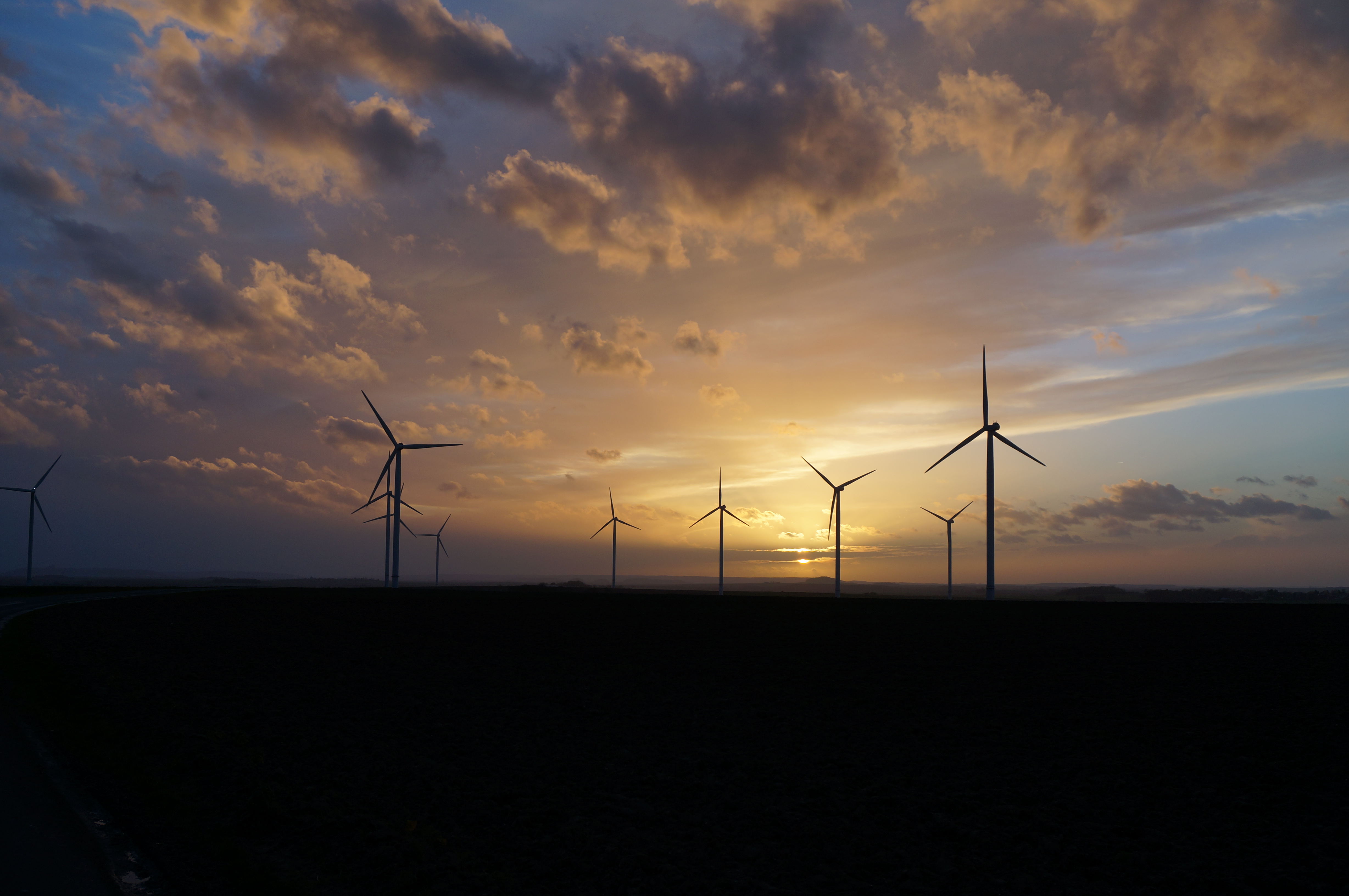 vue depuis La Neuville-Bosmont.